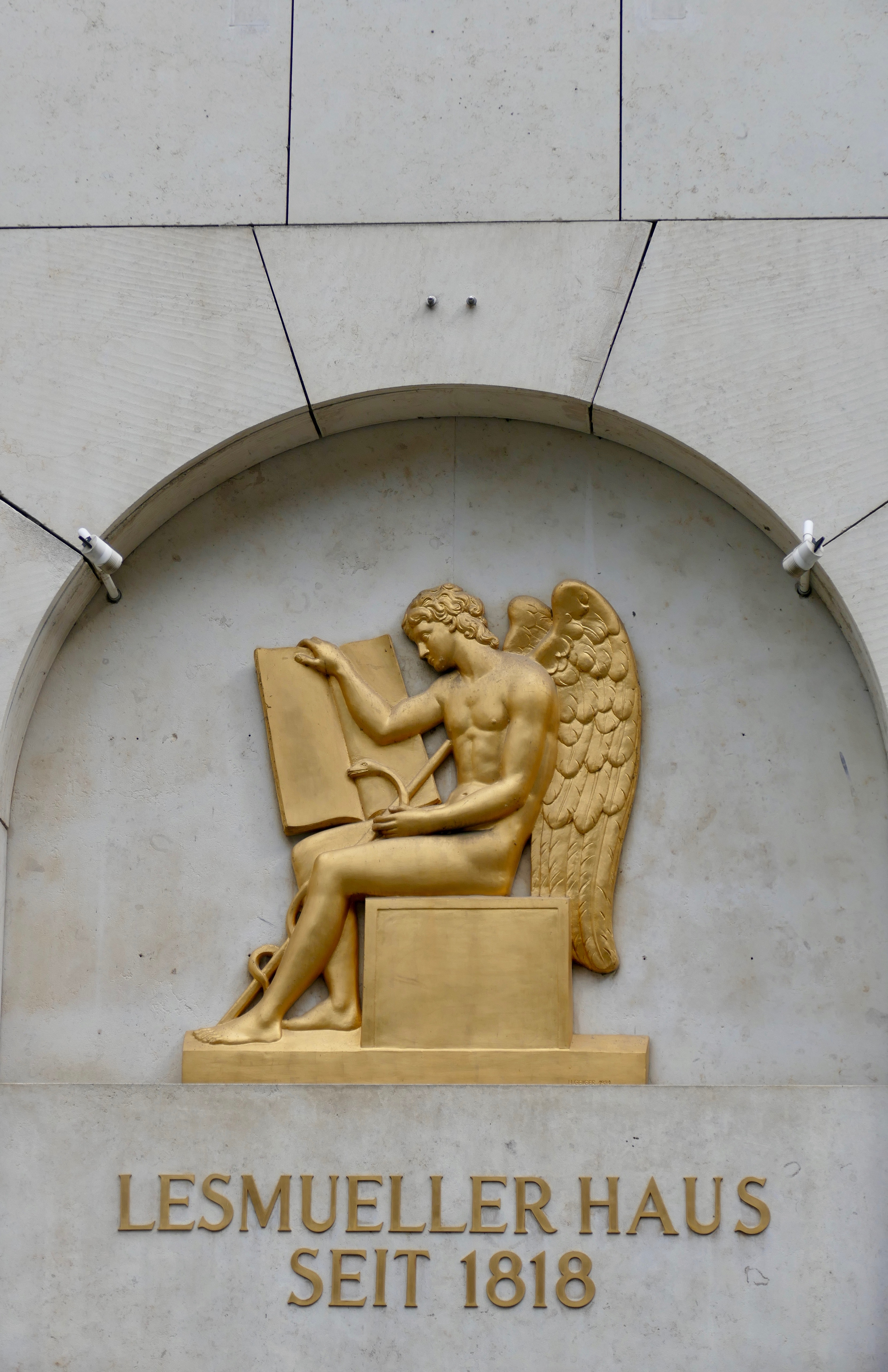 Das Emblem des Apothekengründers Gregor Lesmüller wurde auch am Neubau des Hauses angebracht, der an der selben Stelle steht, wo 1818 die Engel-Apotheke gegründet wurde, in der Theatinerstraße 45.